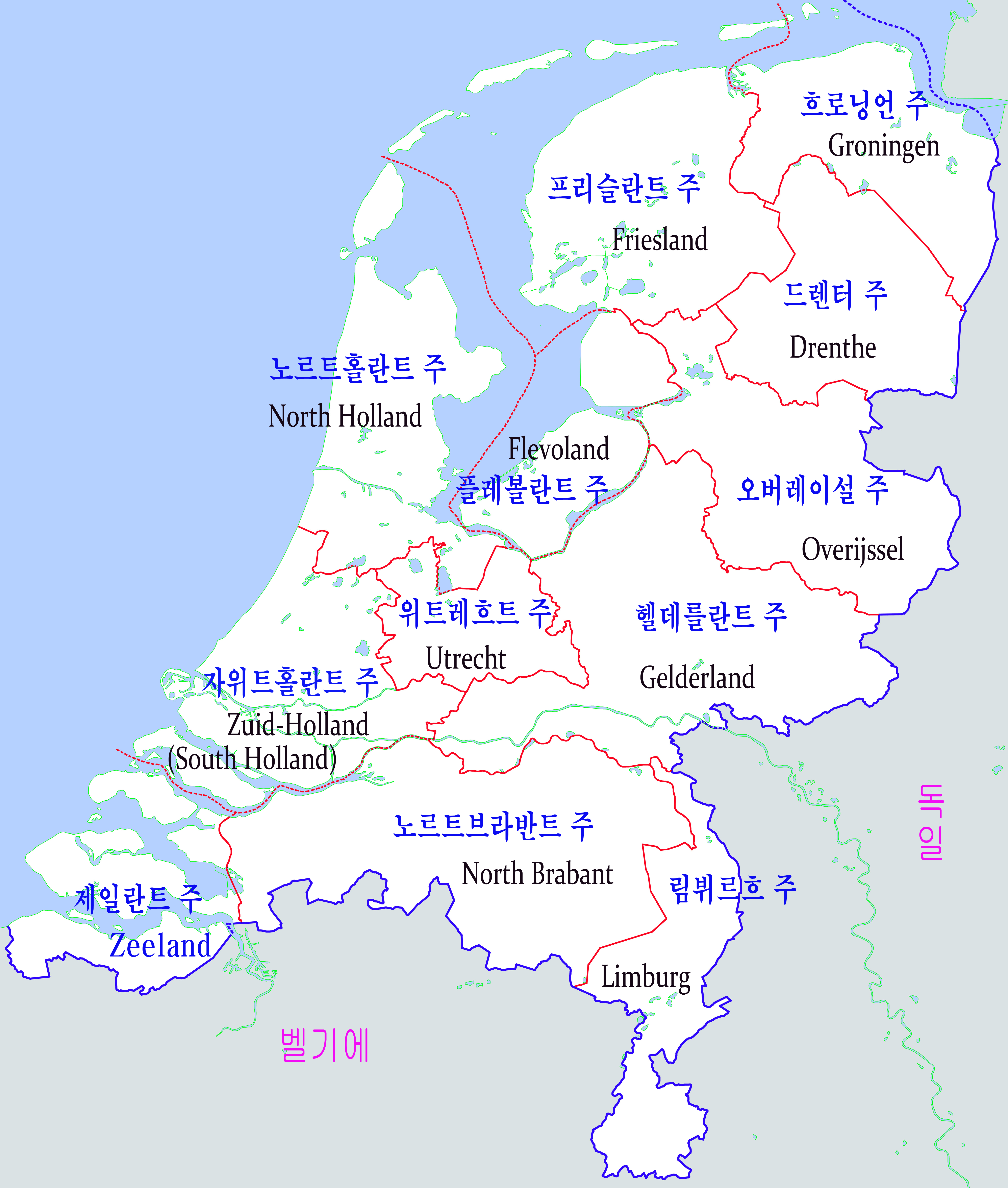 네델란드 행정구역